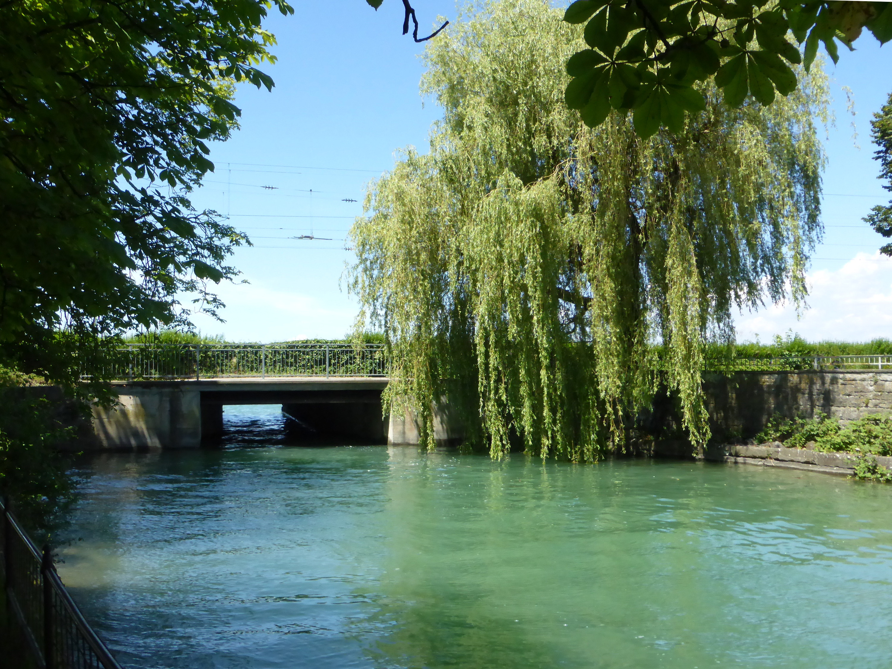 Lindau, die Brücke des Eisenbahndamms von Osten.